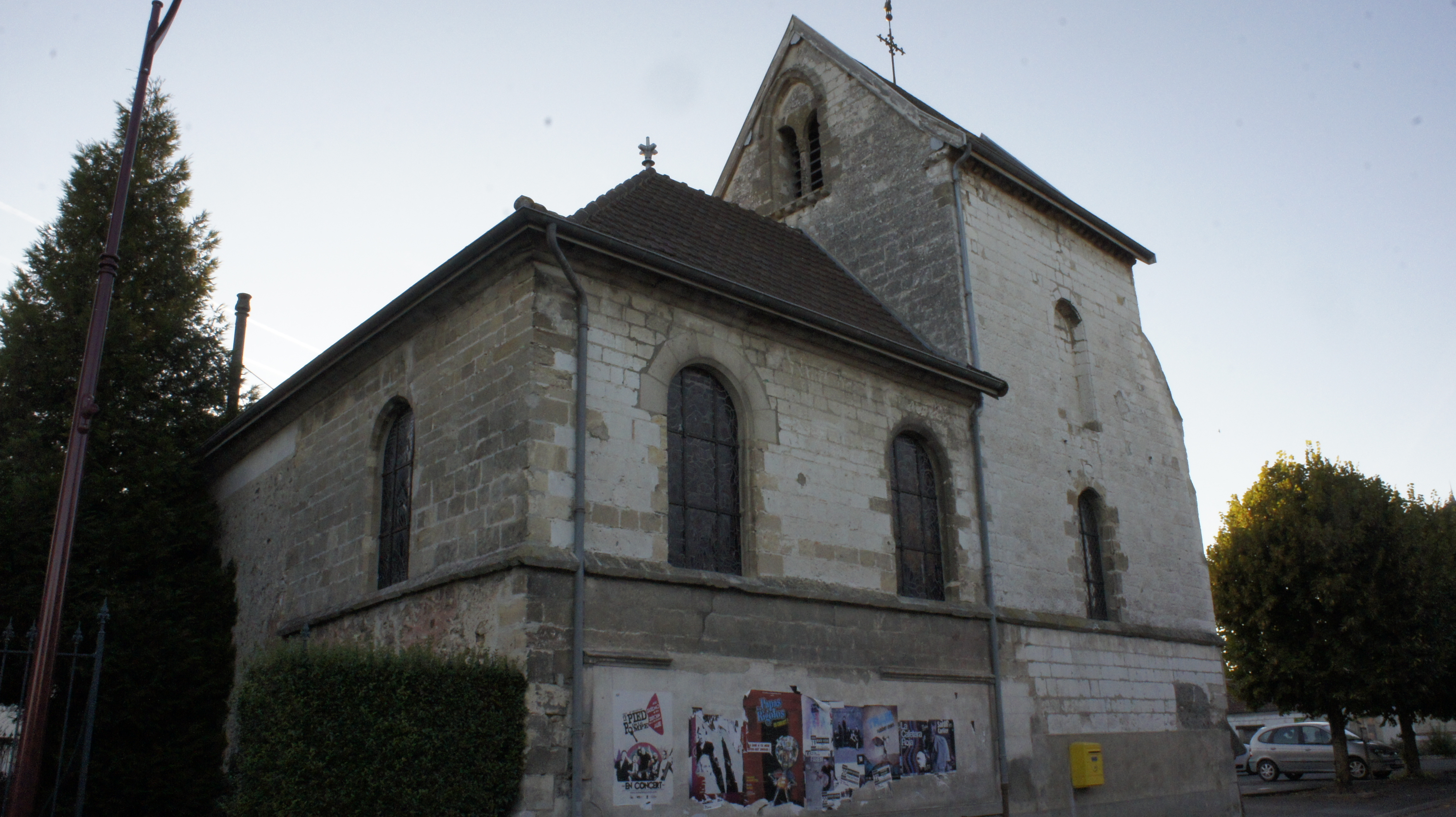 Église des Grandes-Loges, ddédiée à Nicolas.